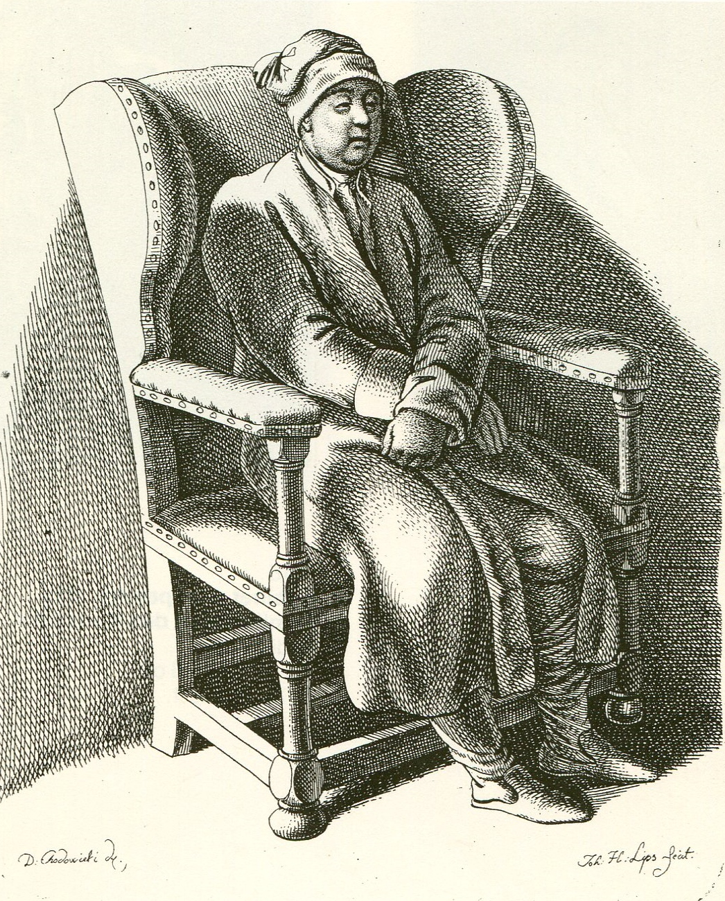 Phlegmatiker im Lehnstuhl